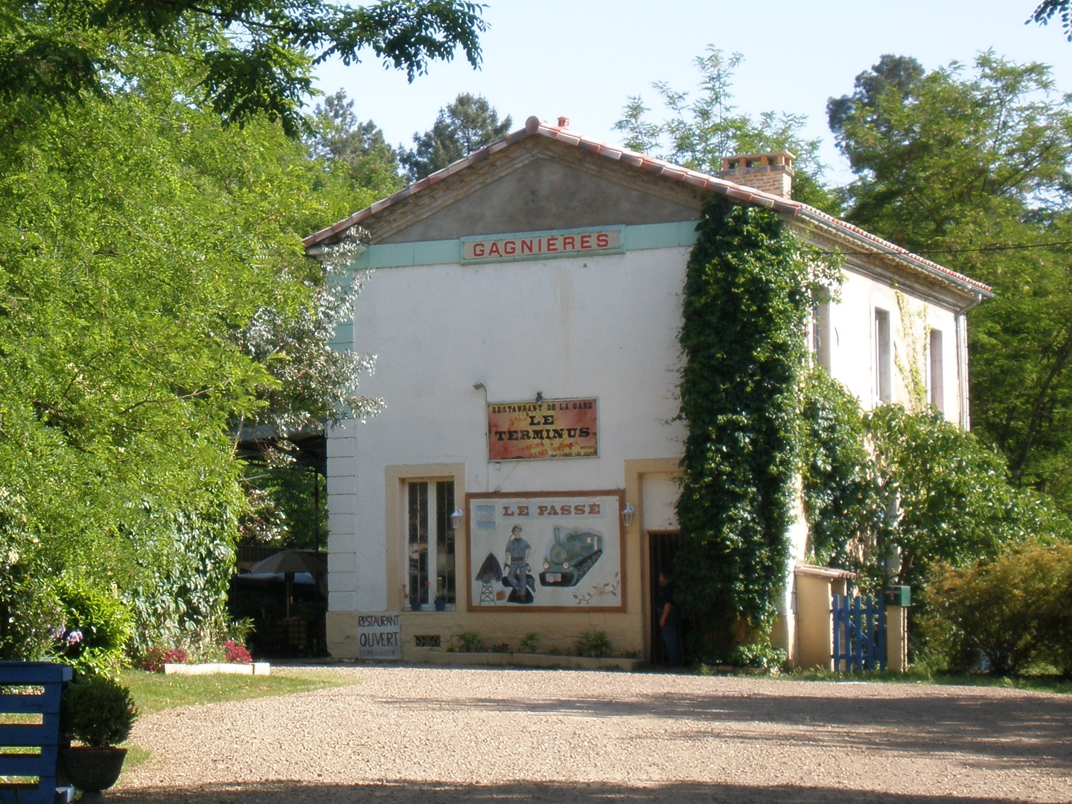 Ancienne gare de Gagnières dans le Gard